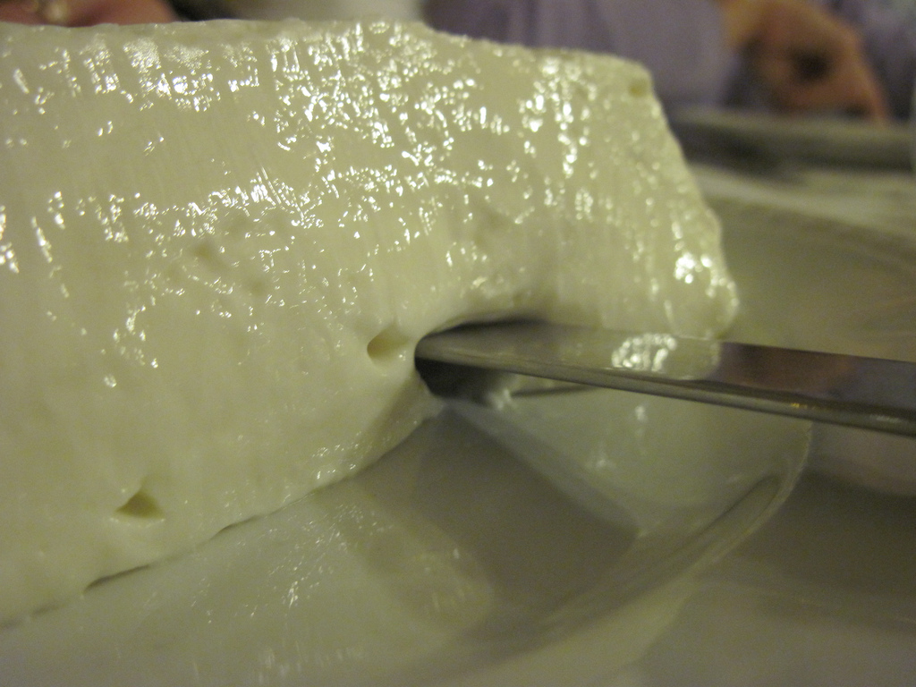 Stracchino